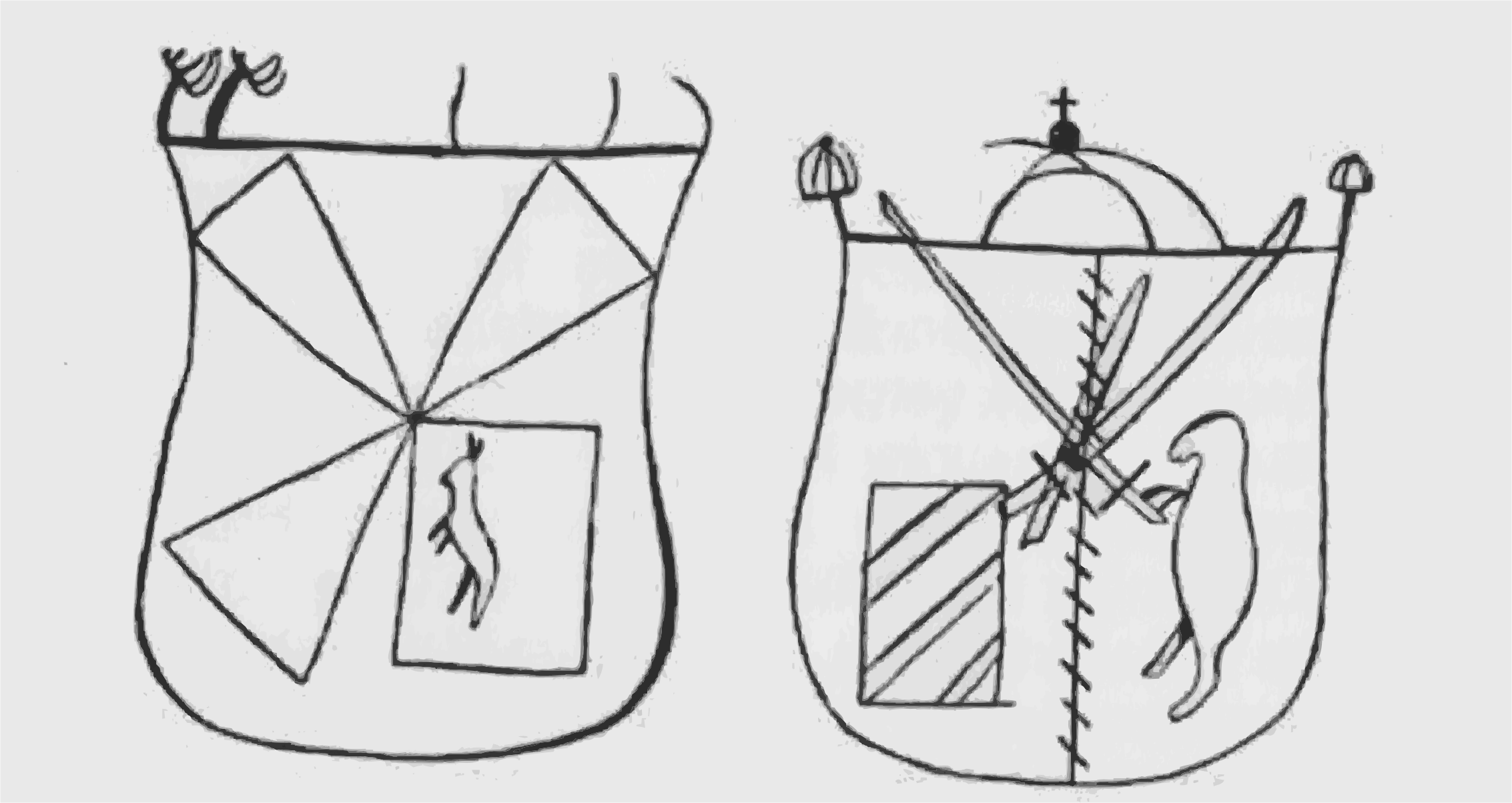 Zwei von insgesamt vier von Kaspar Hauser angefertigten Zeichnungen